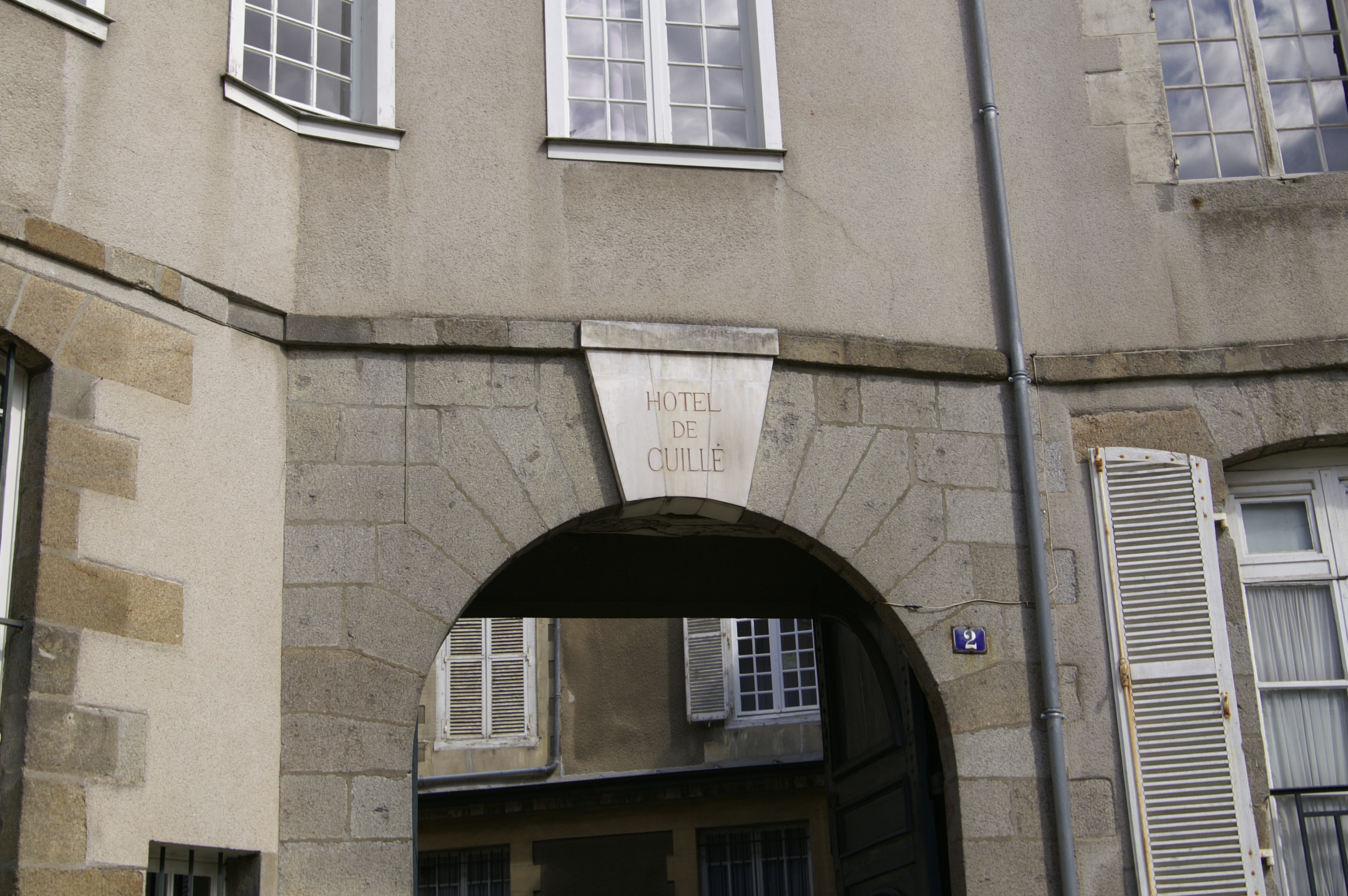 Détail du porche de l’hôtel de Cuillé à Rennes.